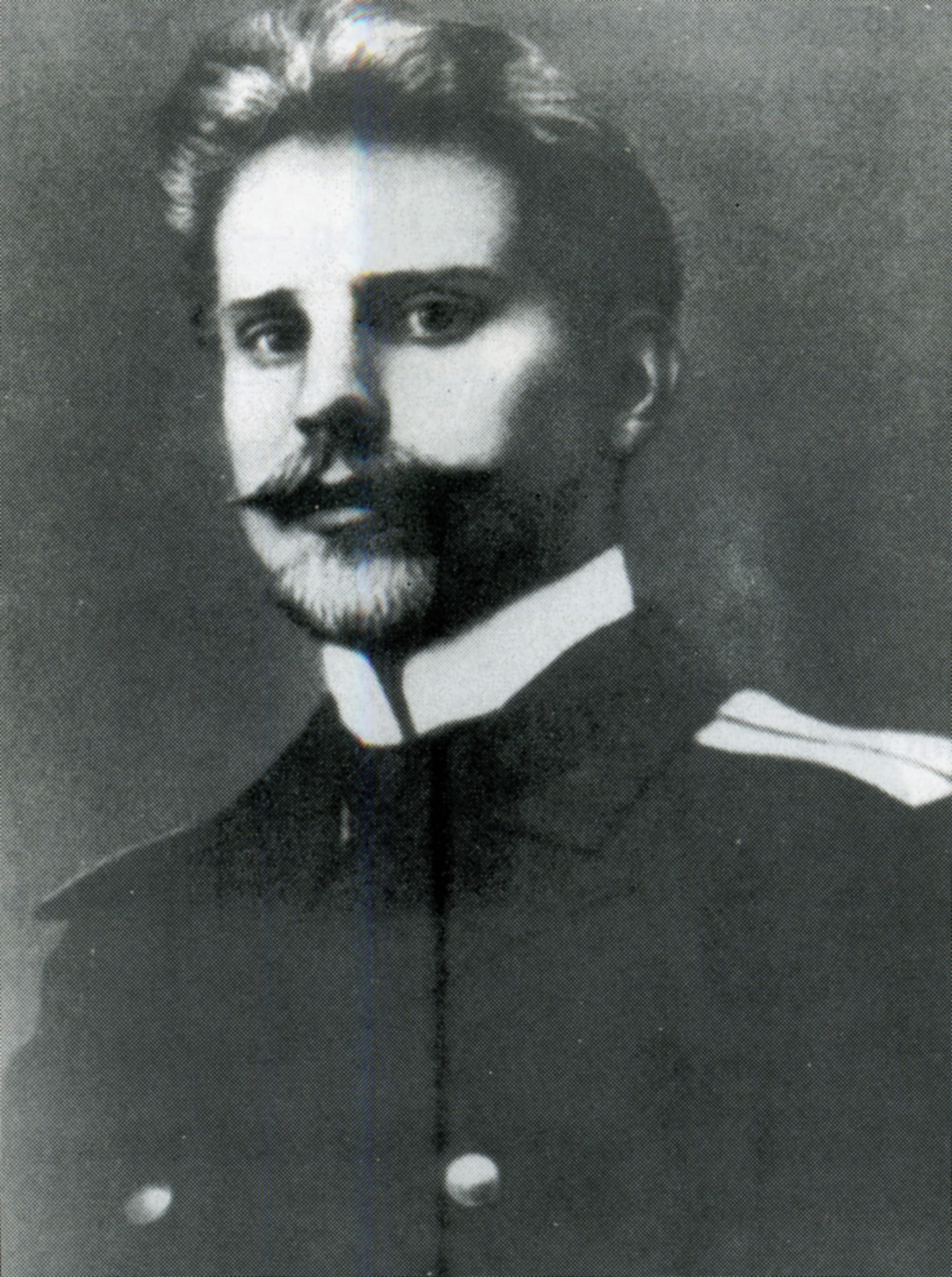 В книге Альтера фото подписано как «Курсант Седов во время учёбы в Ростовских мореходных классах», что соответствует 1884—1889 годам. В книге Ю. А. Сенкевича и А. В. Шумилова «Их позвал горизонт» снимок датирован 16 декабря 1909 года. Влядимир Лях считает, что фотография, вероятно, была сделана после 1901 года.